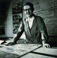 Mina Audemars dans sa classe.